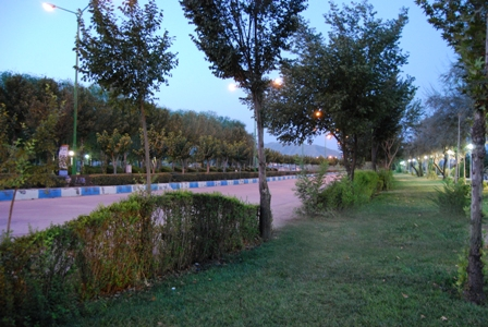 گرفته شده توسط شهرداری محترم /بارگزاری ع .الف